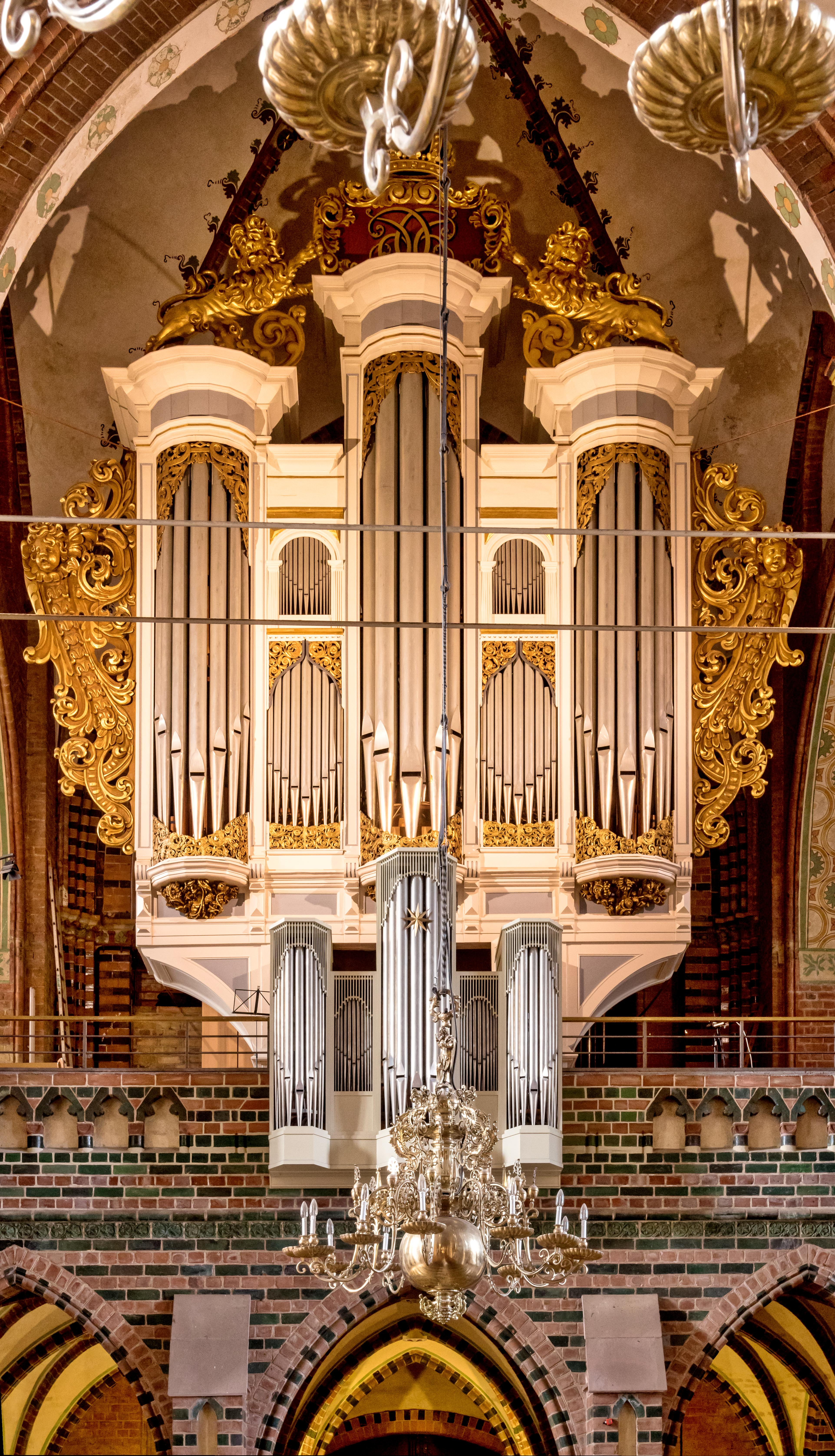 Bilder aus Schleswig Bilder aus dem Inneren Bilder vom Dom St. Petri in Schleswig